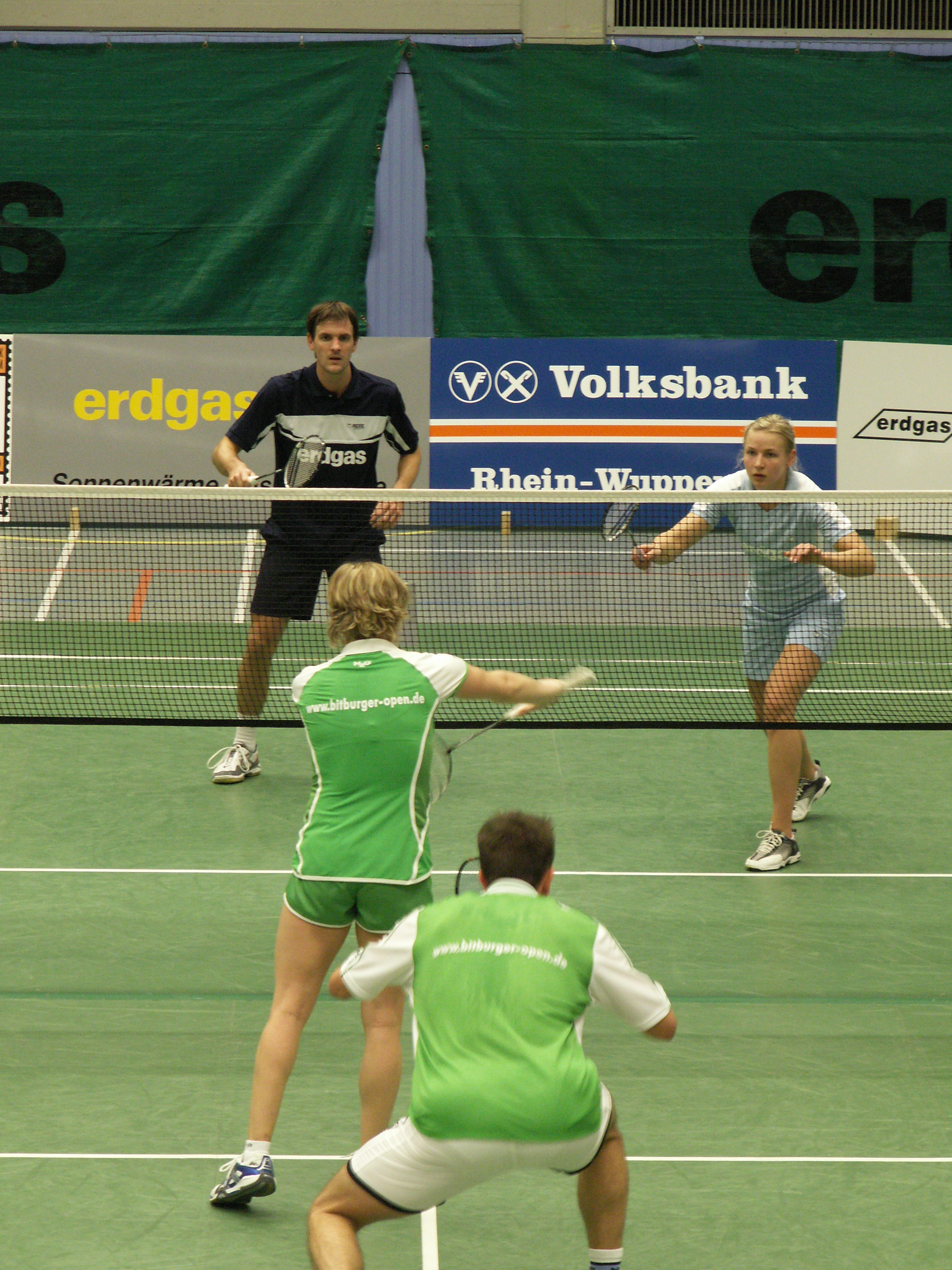 Thorsten Hukriede und Nadieżda Kostiuczyk (beide im Hintergrund) im Mixed gegen den 1. BC Bischmisheim